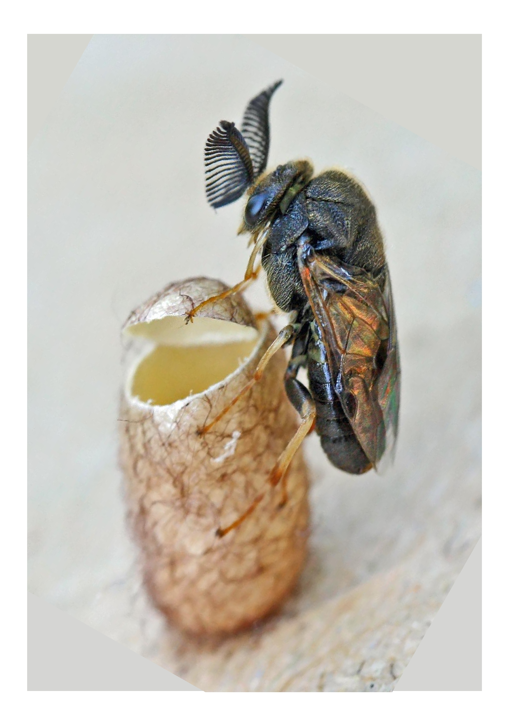 lophyre mâle sortant de son cocon